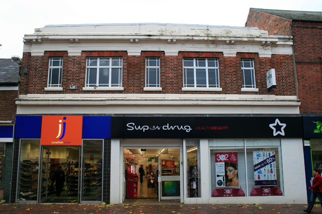 Beeston Superdrug